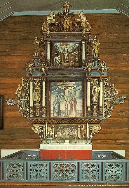 Oppdal kirke